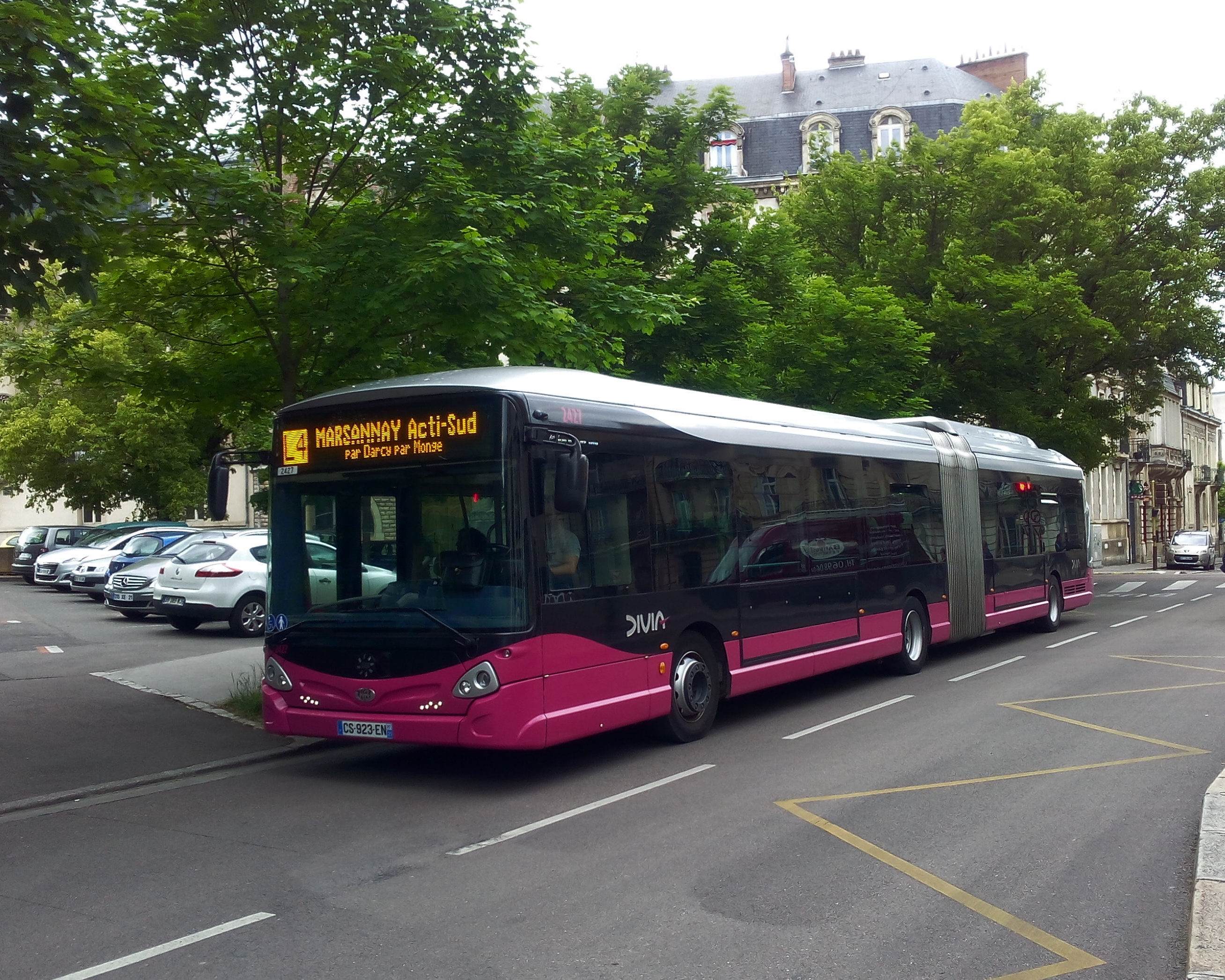 Heuliez GX 427 n°2427 du réseau Divia